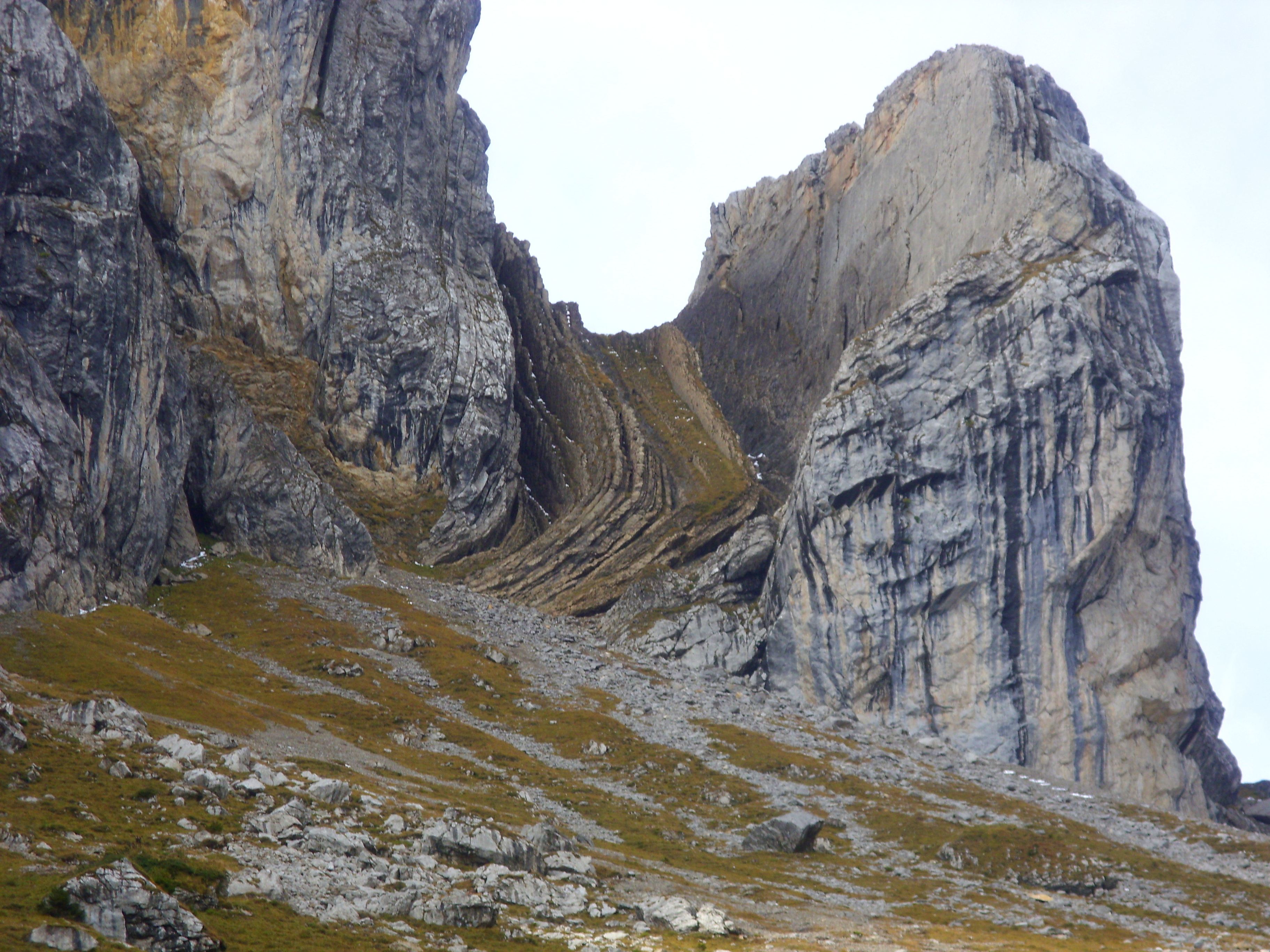 Markante Felsformation am Pilatus, welche von der Pilatusbahn aus sichtbar ist.